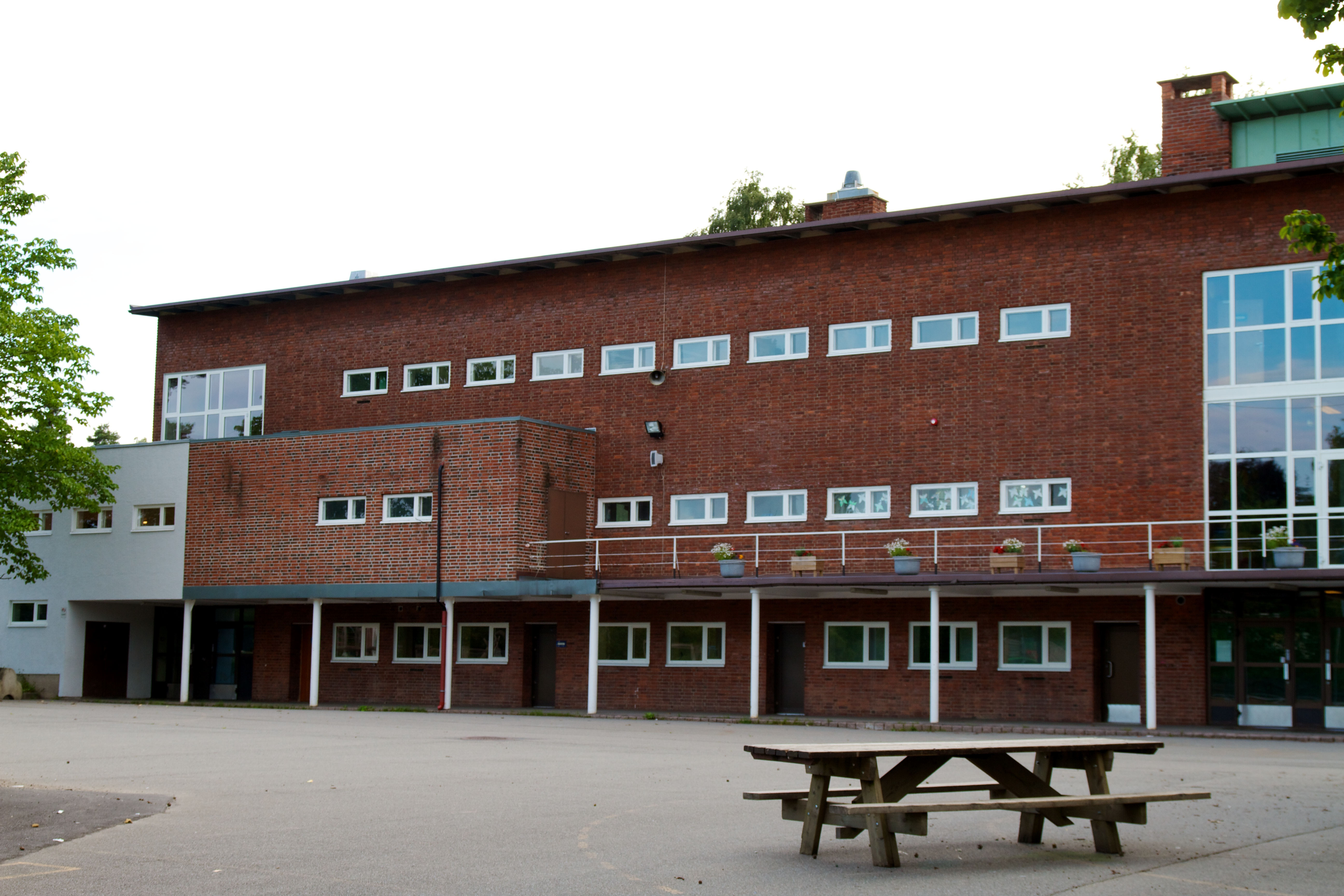 Slemdal skole i Oslo.